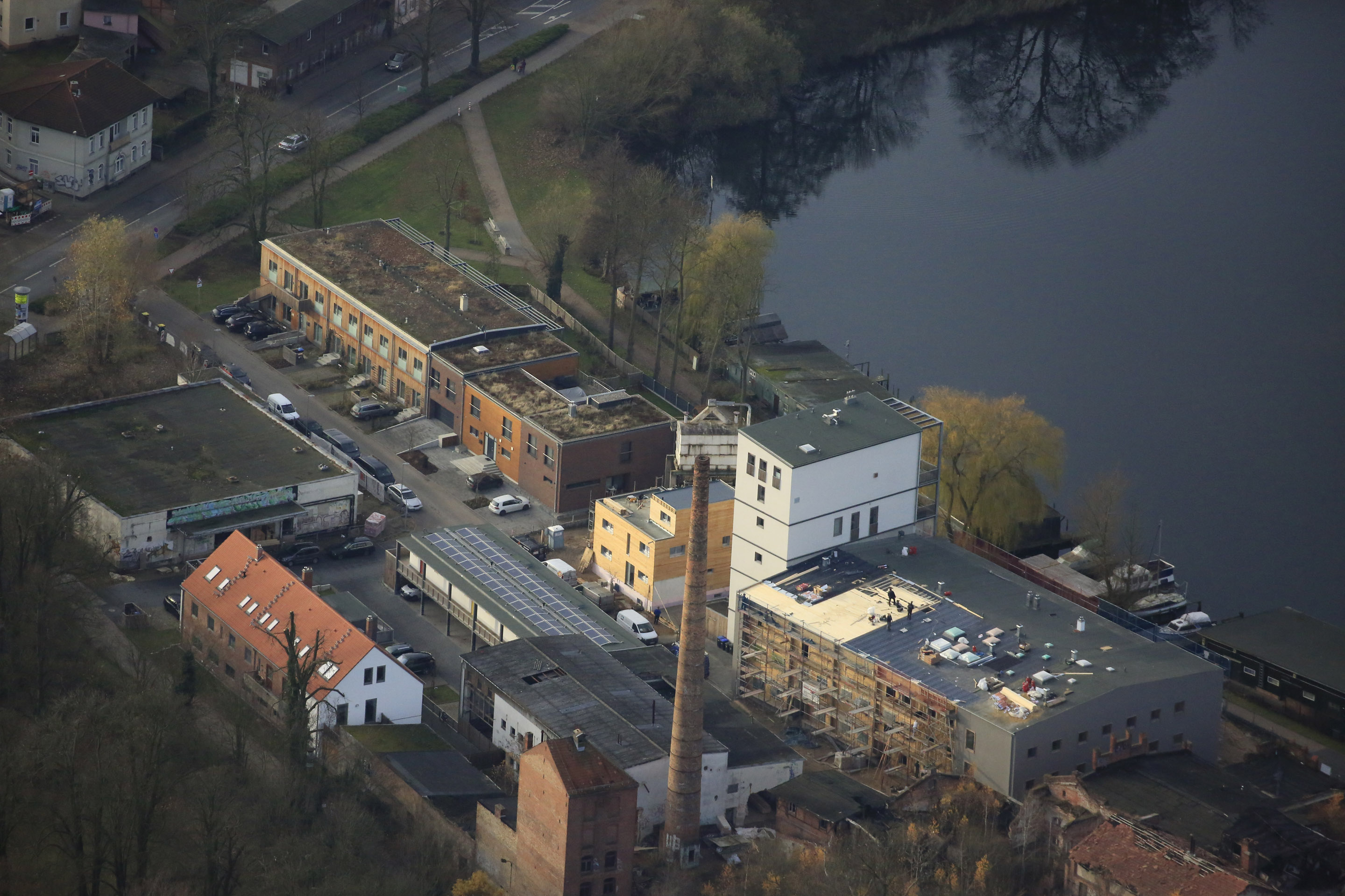 Luftaufnahme des Schall-und-Schwenke-Wegs in Schwerin (Alte Brauerei) - Aufnahme vom November 2016